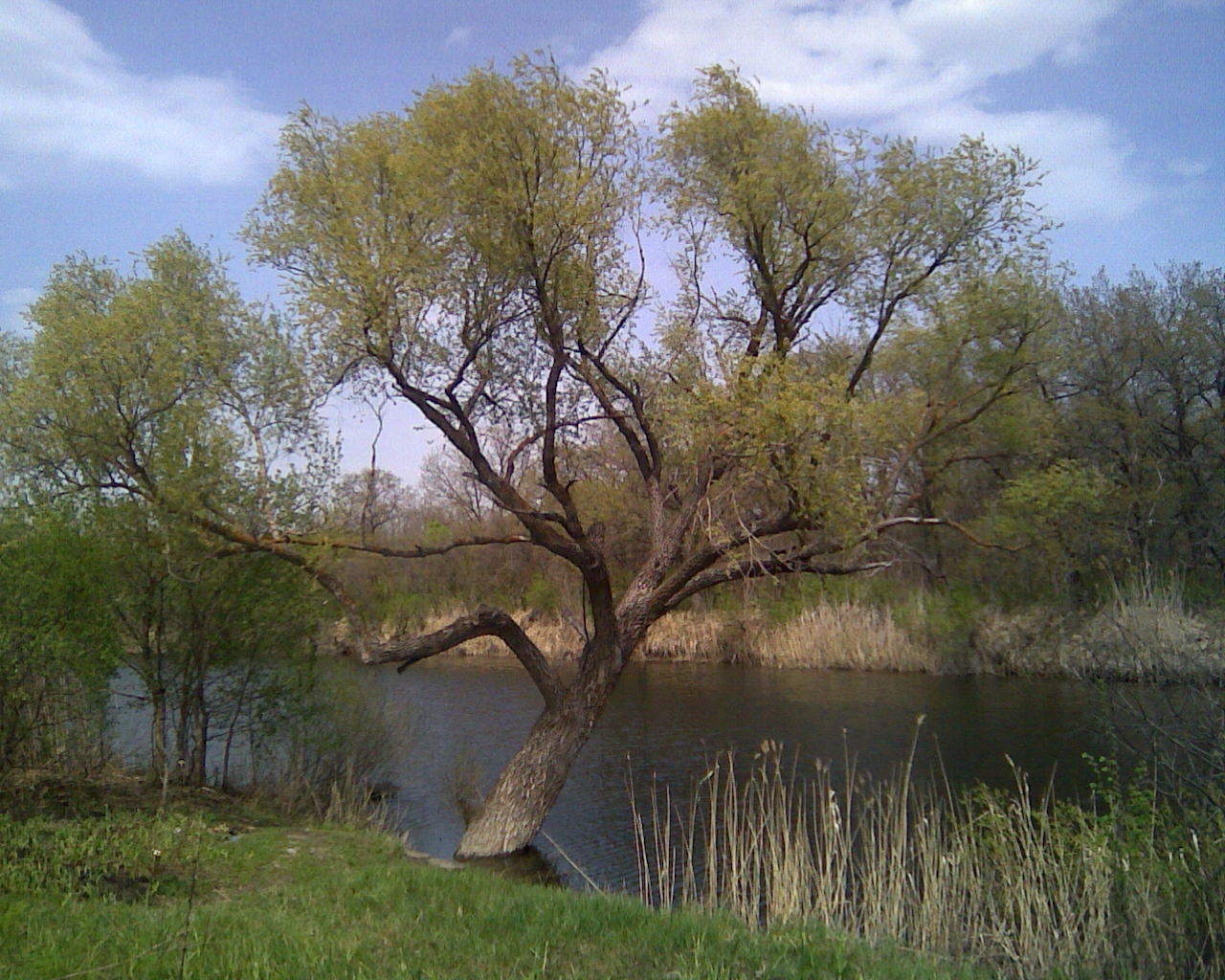 Река Иловля в Ольховском районе Волгоградской области